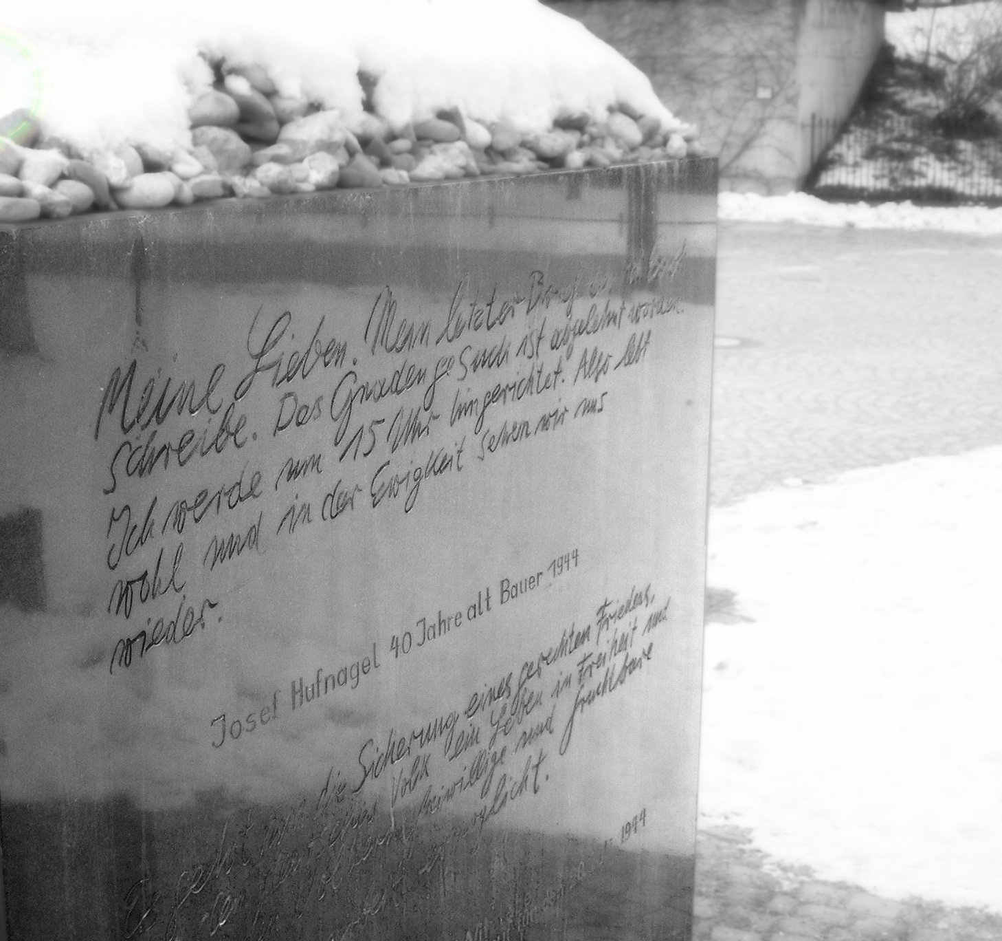 Mahnmal für den Widerstand gegen den Nationalsozialismus von Leo Kornbrust im Hofgarten, München. Das Foto zeigt die nach Osten gerichtete Seite des Steinwürfels mit den Zitaten von Josef Hufnagel und General Erwin von Witzleben